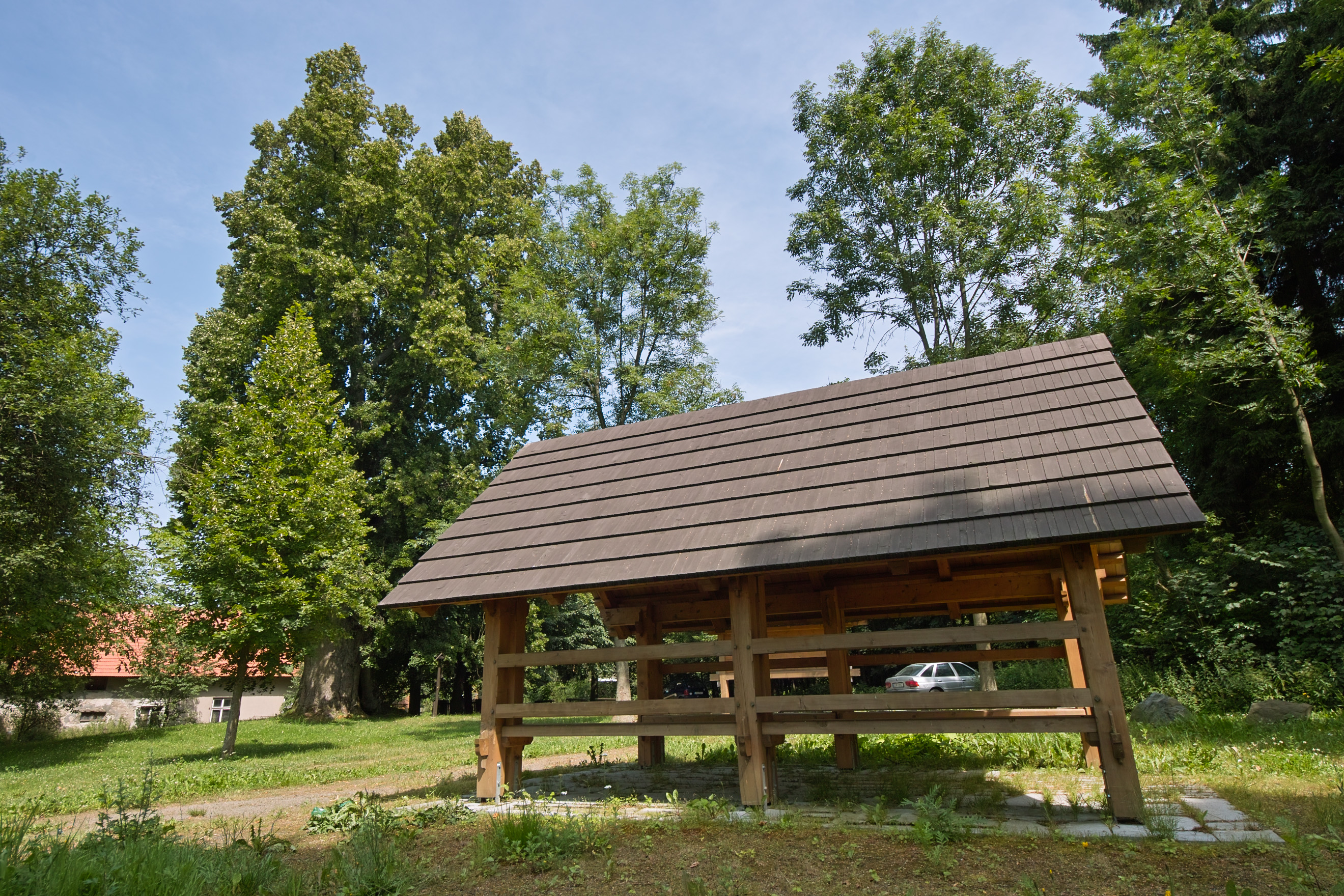 Štikov u Slavíkova - vyhlídkový park s dřevěným přístřeškem a památnou lípou